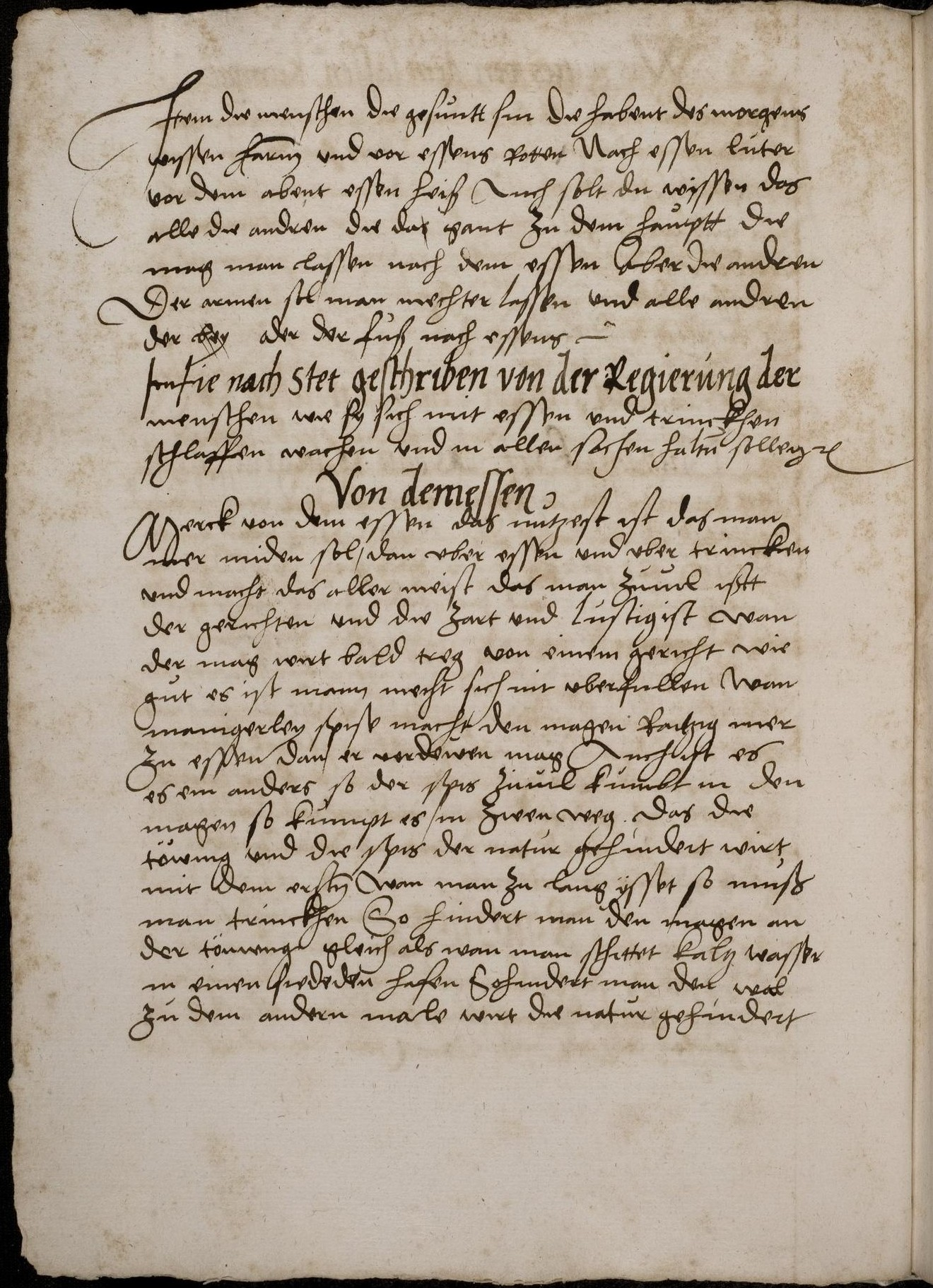 Codex Palatinus germanicus 1, "Astrologisch-medizinische Sammelhandschrift", Blatt 12v der Handschrift: "Konrad von Eichstätt, Regel der Gesundheit (Von demessen)"